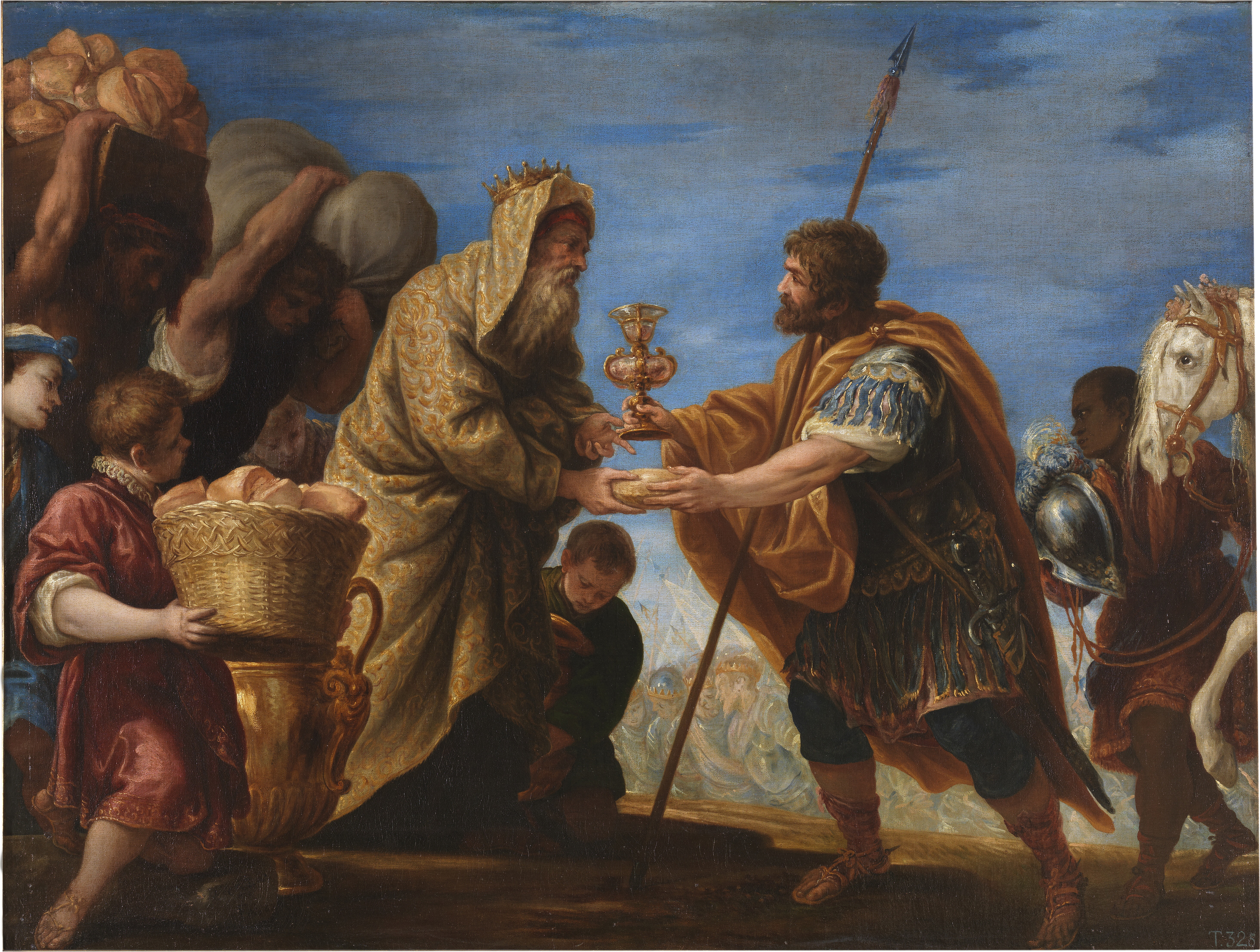 La obra representa al patriarca hebreo Abraham junto al sacerdote Melquisedec.